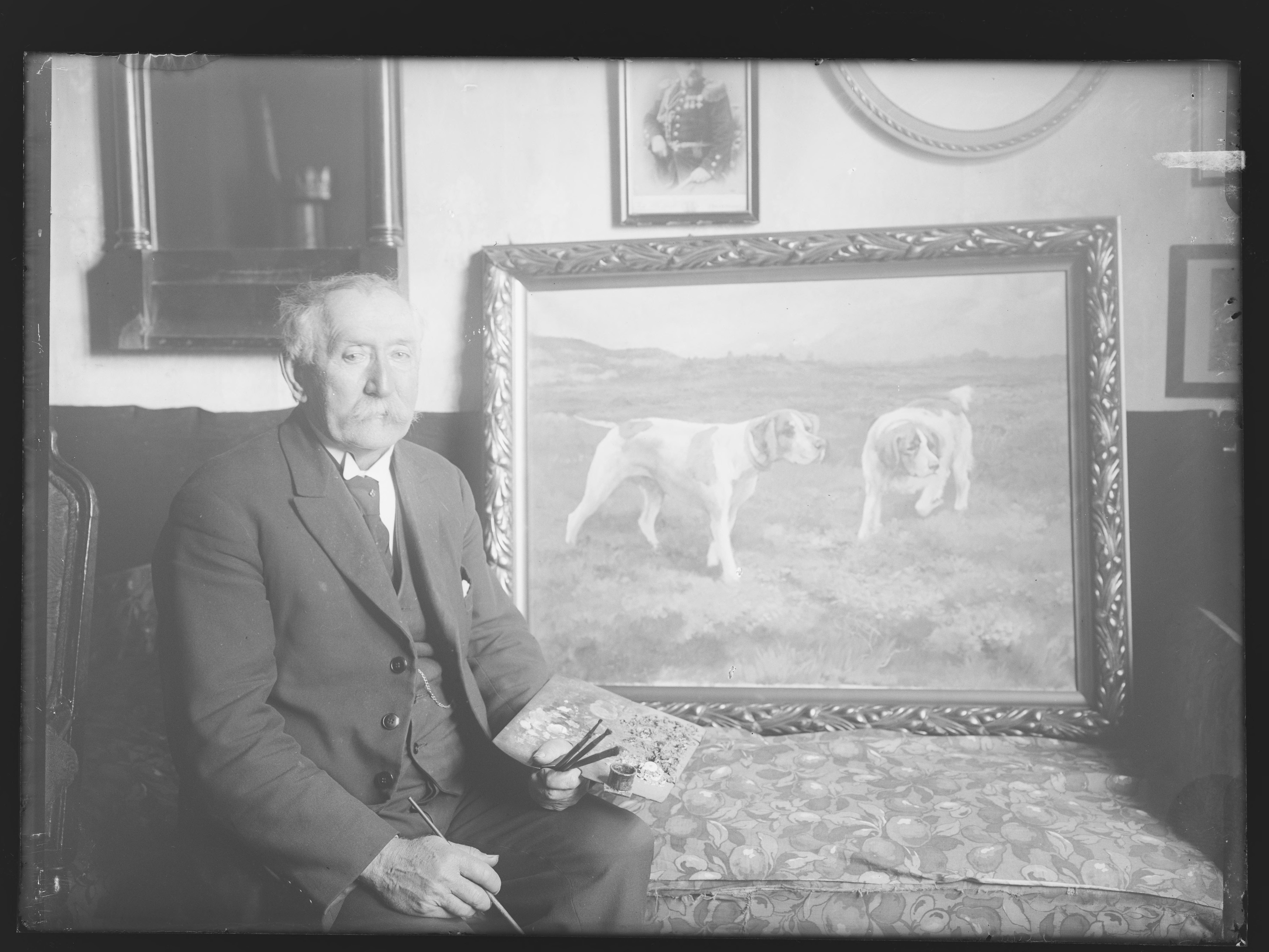 Bildet er hentet fra Nasjonalbibliotekets bildesamling. Anmerkninger til bildet var: Påskrift arkivark: Kunstmaler Karl Uchermann Arkivnummer: 510